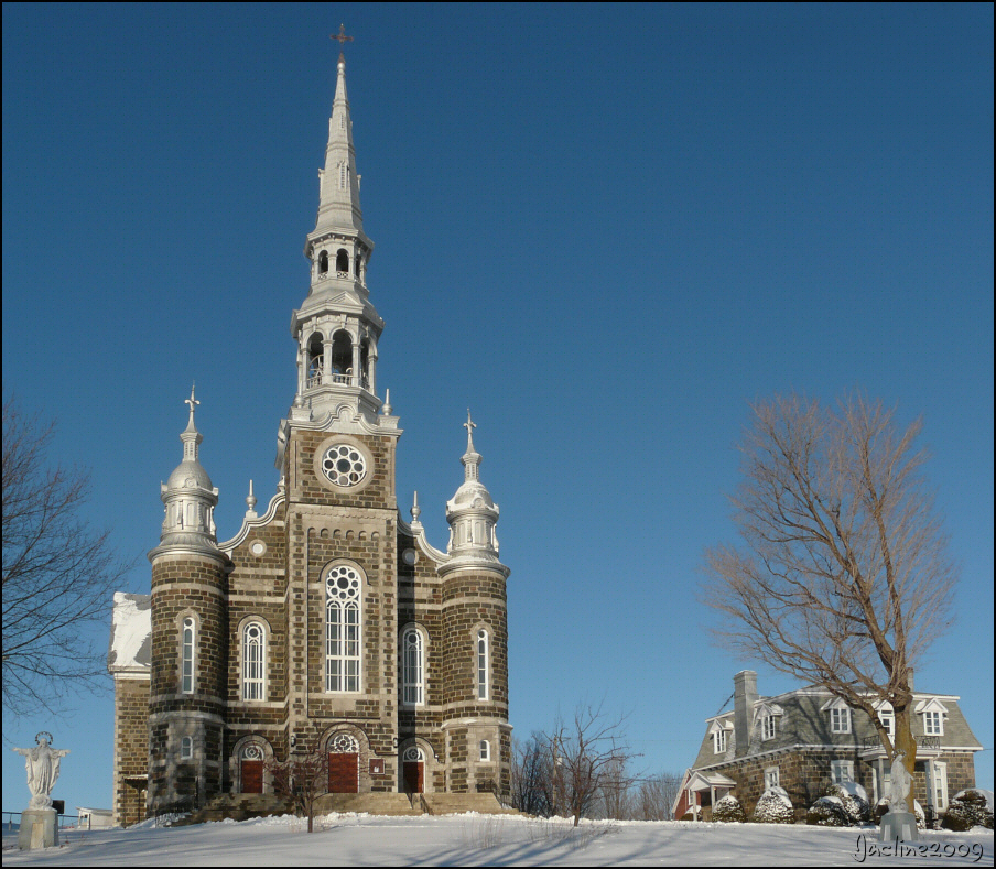 Église Saint-Félix-de-Kingsey et son presbytère (à la droite). Elle a été construite vers 1870.